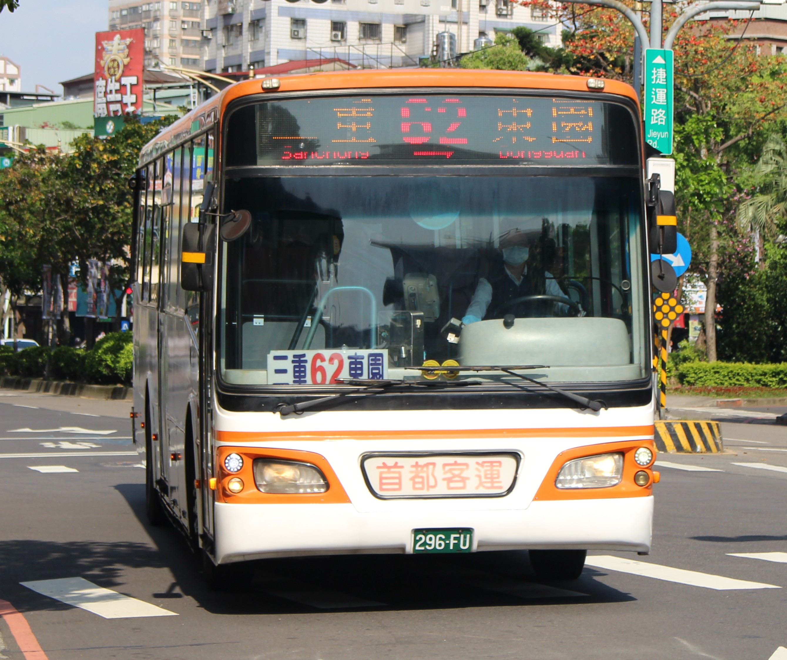 首都客運296-FU 62